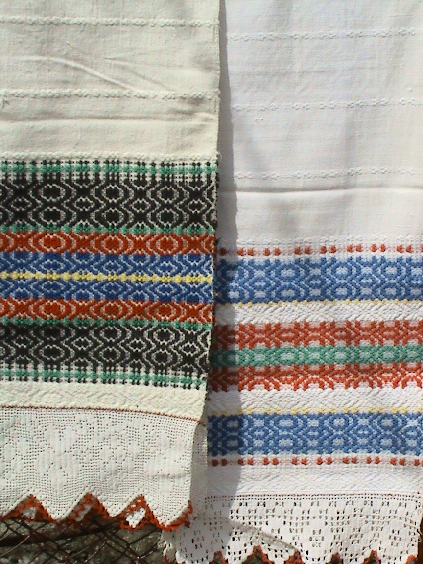 Ştergar tradiţional din Racoviţa, Sibiu.